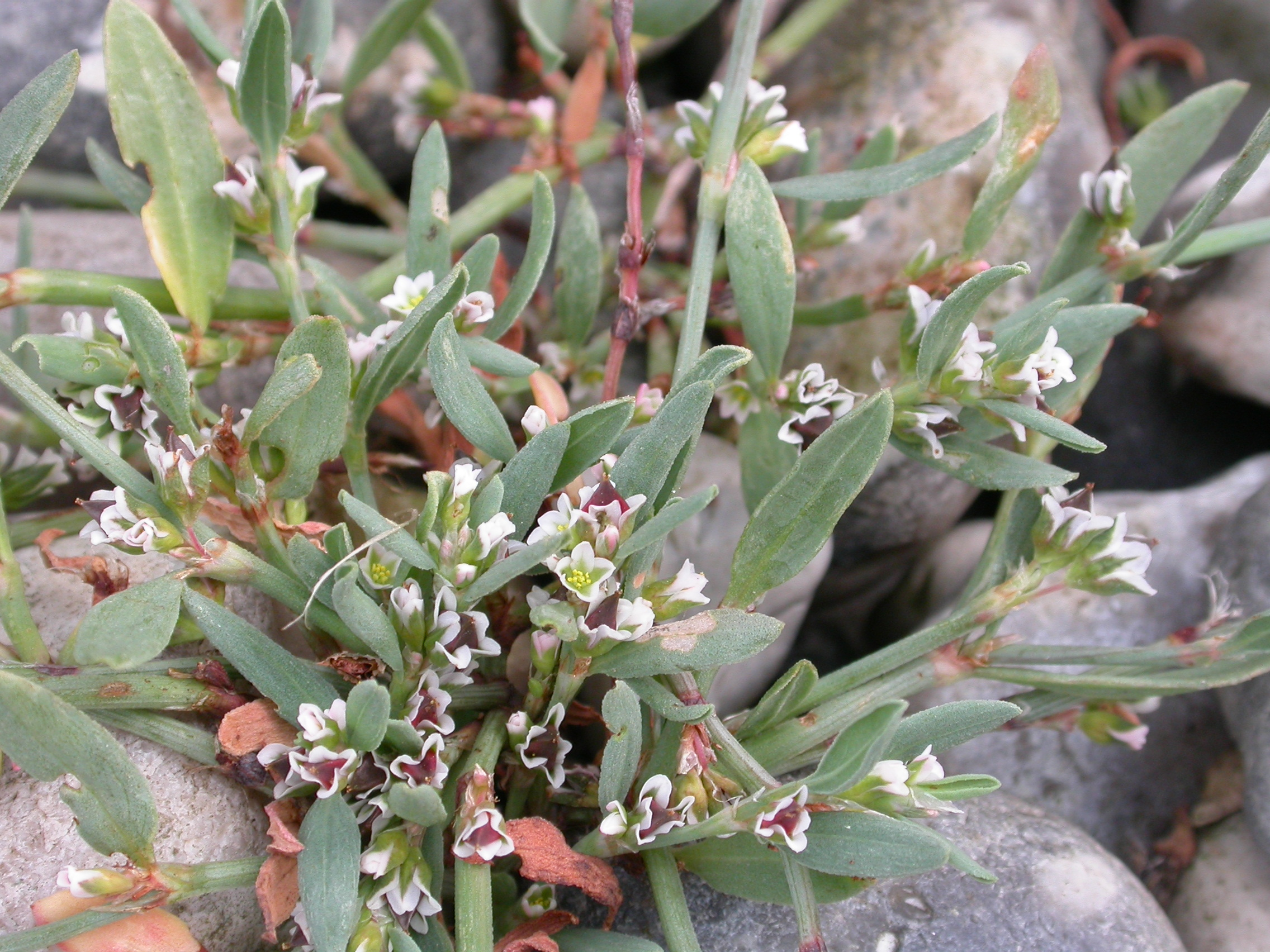 Polygonum oxyspermum Cayeux-sur-Mer (Somme), France